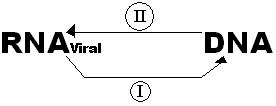 Esquema de produção do RNA viral. É de minha própria autoria.